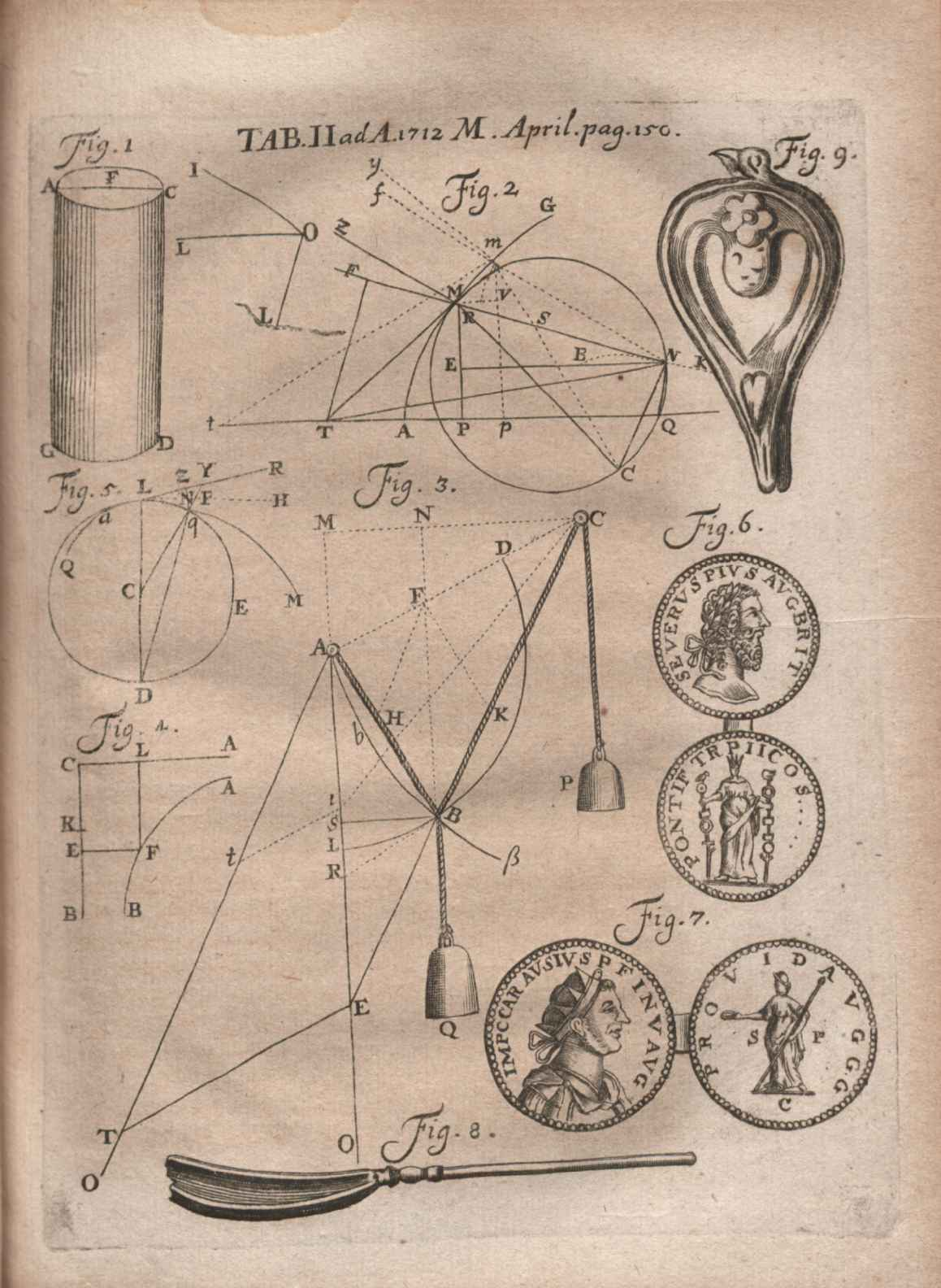 Illustration